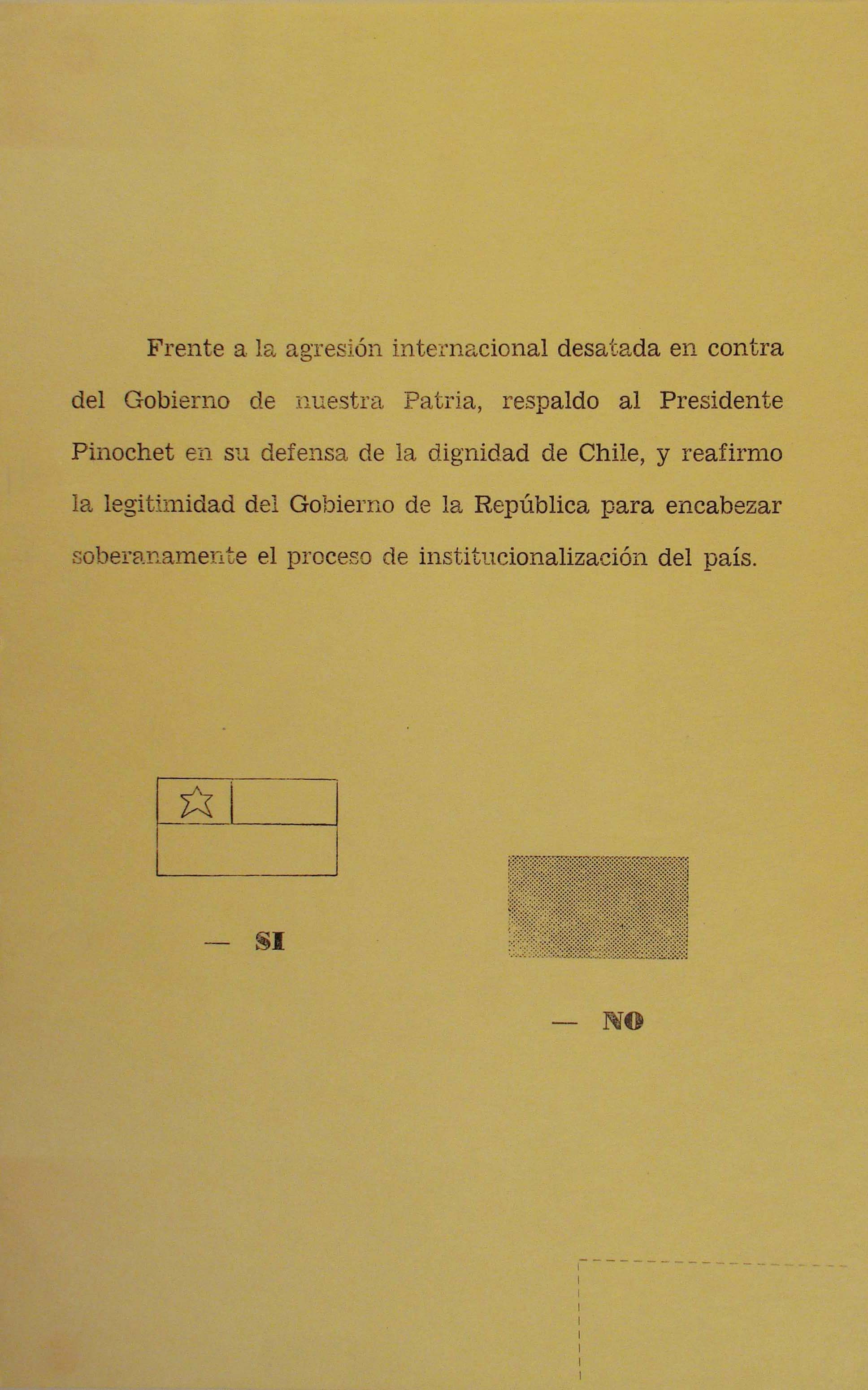 Ejemplo de voto del plebiscito de 1978 donde, además de inclurise afirmaciones extraordinarias y una redacción de dos proposiciones, se colocó una bandera chilena junto al SI (en favor de Pinochet), y una bandera negra (como oposición).